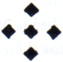 "Pentastigme" tiré de la page de titre de l'édition de 1850 du "Calendrier Agathopédique et Saucial"